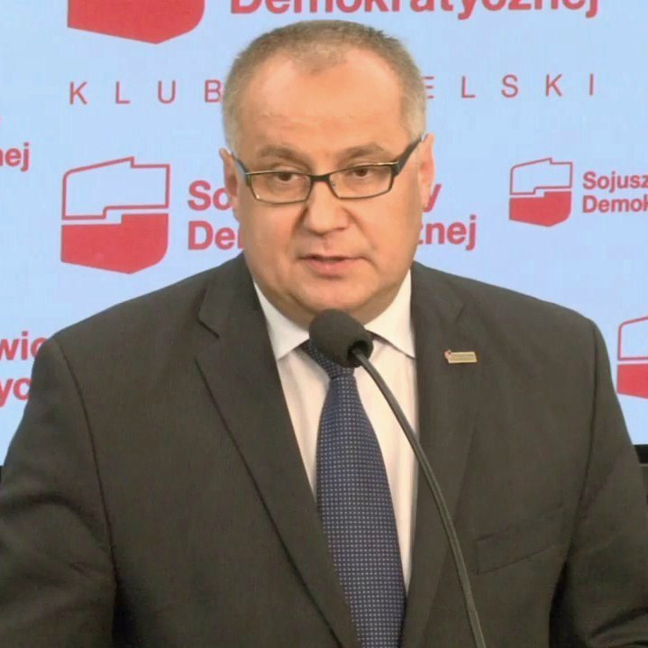 Marek Wikiński, prawnik i lewicowy polityk (poseł).